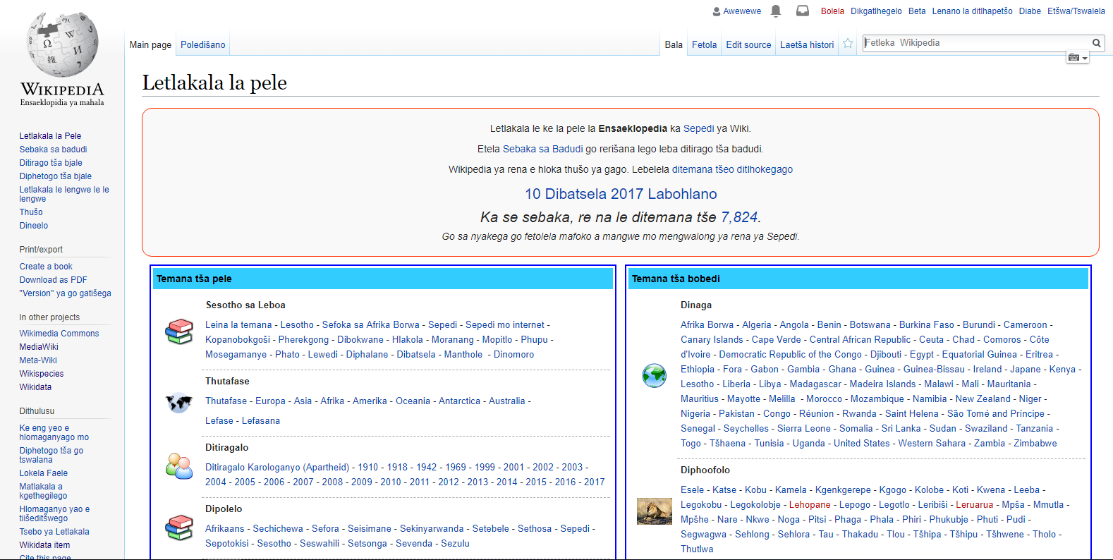 Hlavní strana severosotské Wikipedie